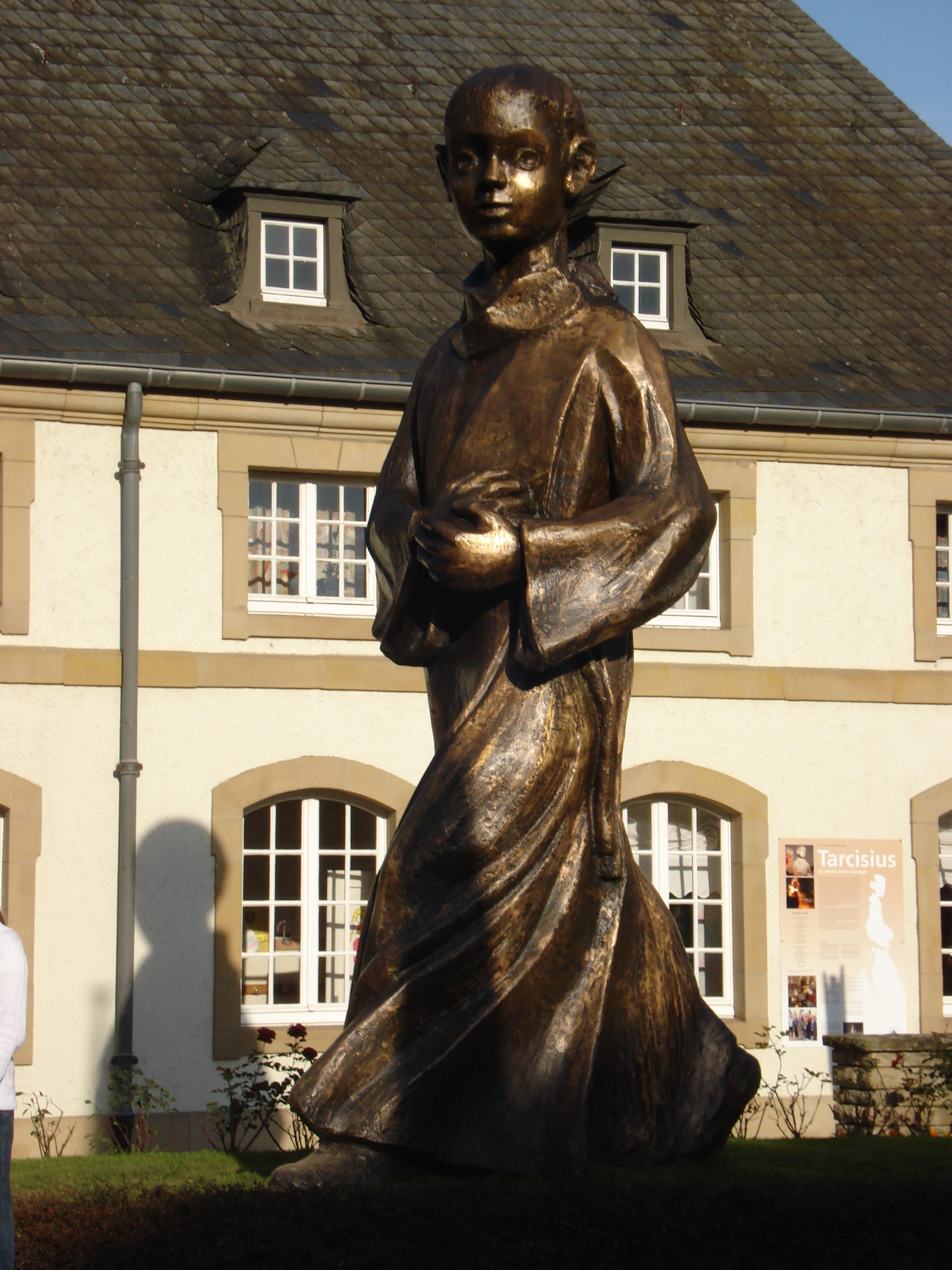 Tarcisius in Echternach - Diese Statue wurde von Bernhard Lang geschaffen.